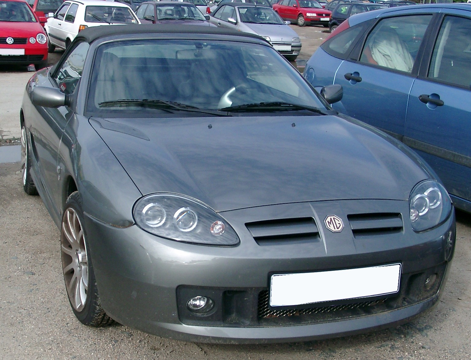 MG TF Spark